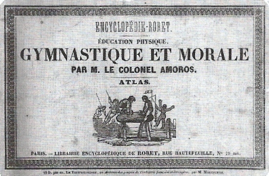 couverture originale d'un ouvrage de Francisco Amoros (décédé en 1848)